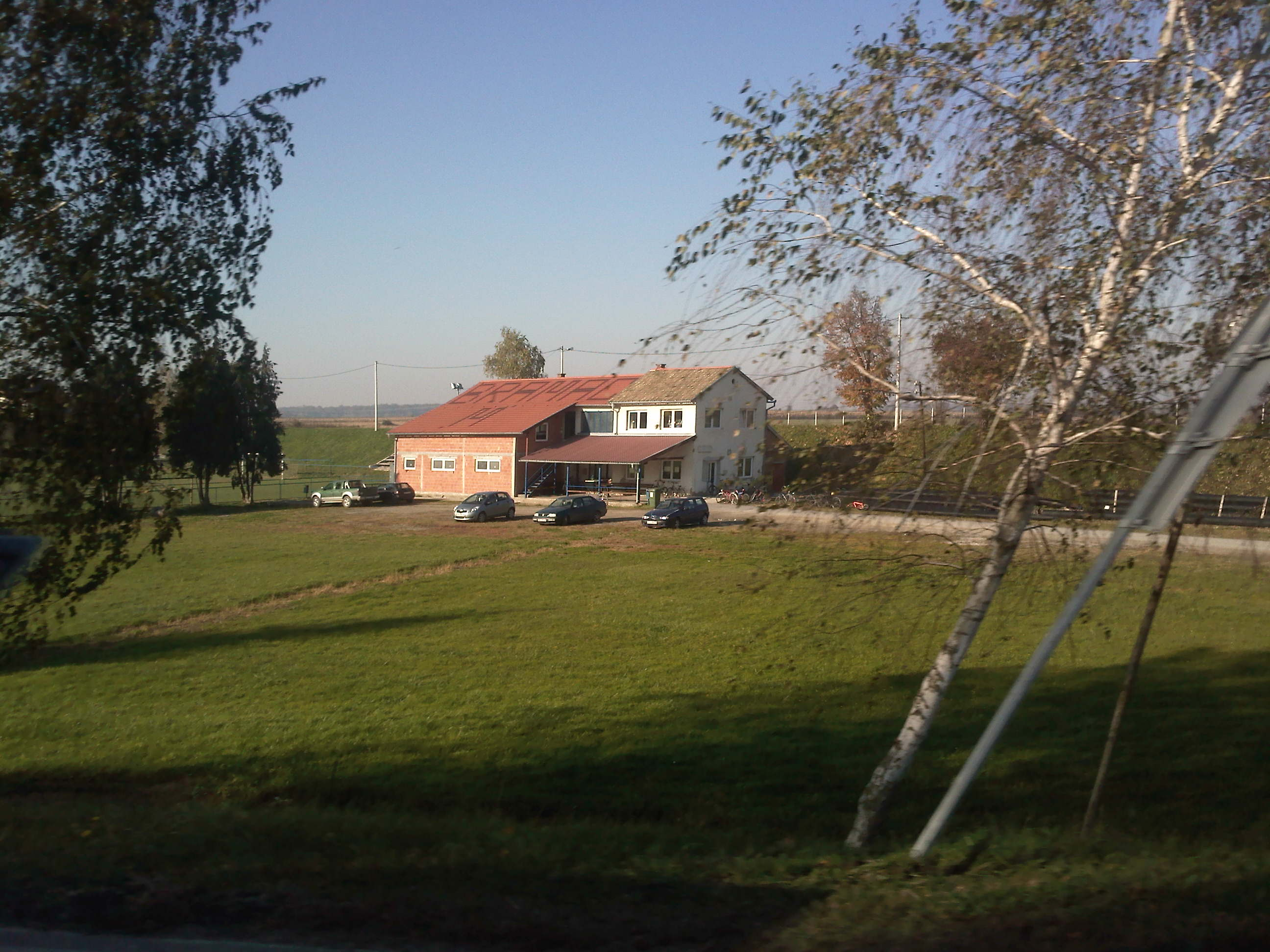 Čačinci